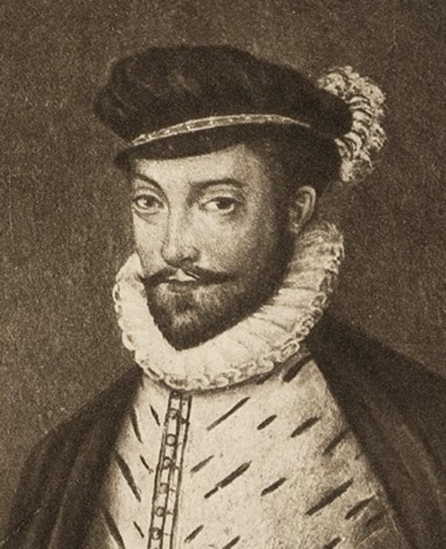 Portrait de Léonor d'Orléans, duc de Longueville